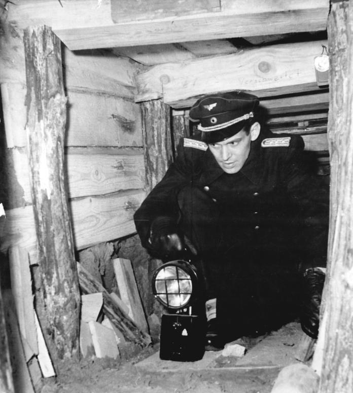 Zentralbild-Junge-1.2.1962-Gefährliche Provokation an der Staatsgrenze der DDR-Durch Agentenschleuse Eisenbahnverkehr aufs äusserste gefährdet. Ein neues eklatantes Beispiel für die friedensgefährdende Rolle der Westberliner Frontstadt-Politik ist am 1.2.1962 auf einer internationalen Pressekonferenz in Berlin enthüllt worden. Vor in- und ausländischen Journalisten, darunter Vertretern westdeutscher Zeitungen informierte der Minister für Verkehrswesen der DDR, Erwin Kramer, auf dem Gelände des S-Bahnhofes Wollankestrasse über die ungeheuerliche Tatsache, dass Westberliner Banditen unter gröbster Verletzung der Staatsgrenze der DDR durch die Gewölbe dieses Bahnhofes ein Stollensystem vorgetrieben haben. Durch die Anlage dieses Stollensystems sollten Agenten und Diversanten von Westberlin in das Gebiet der DDR eingeschleust werden. UBz: Im Stollen